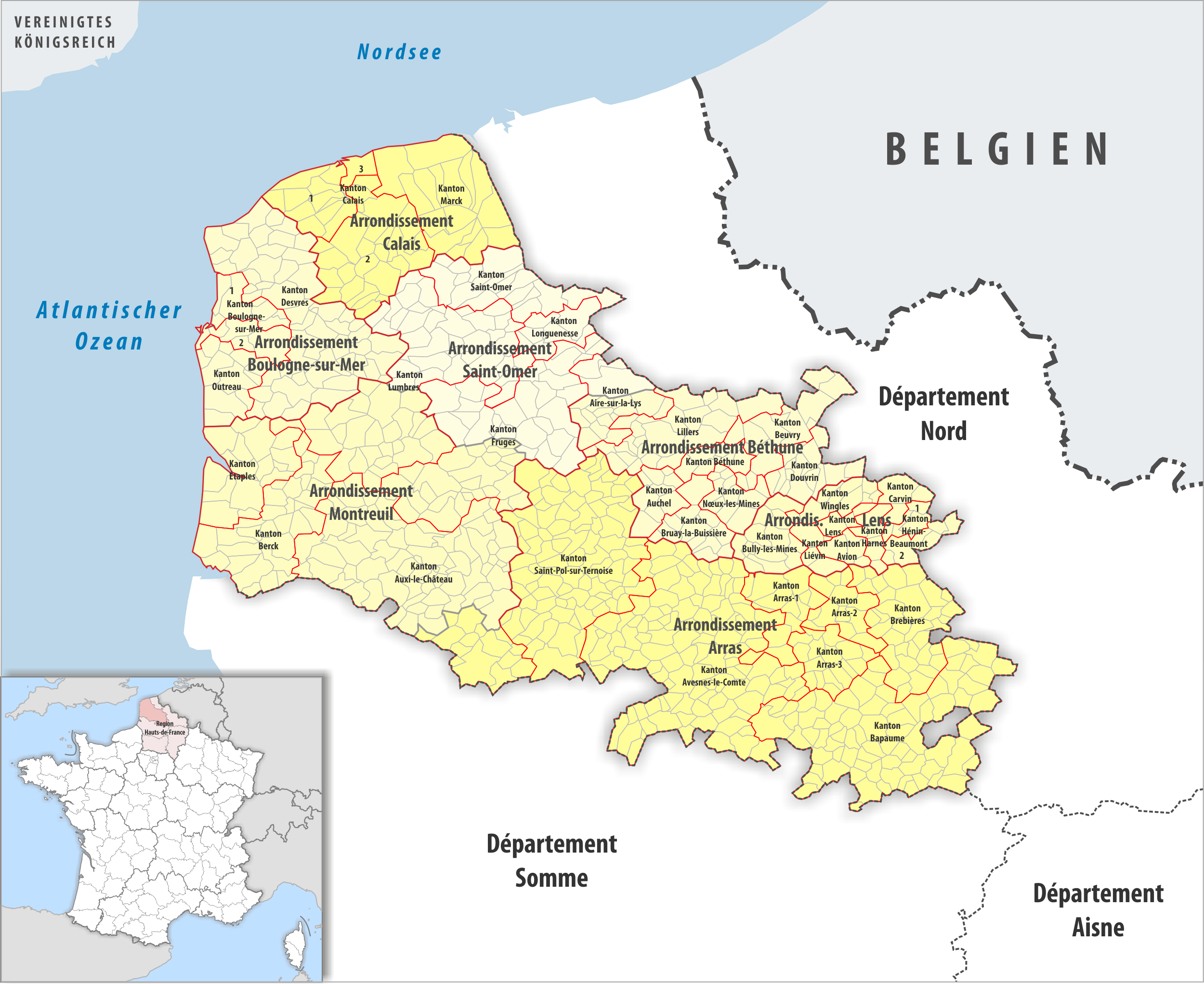 Gemeinden, Kantone und Arrondissemente im Departement Pas-de-Calais